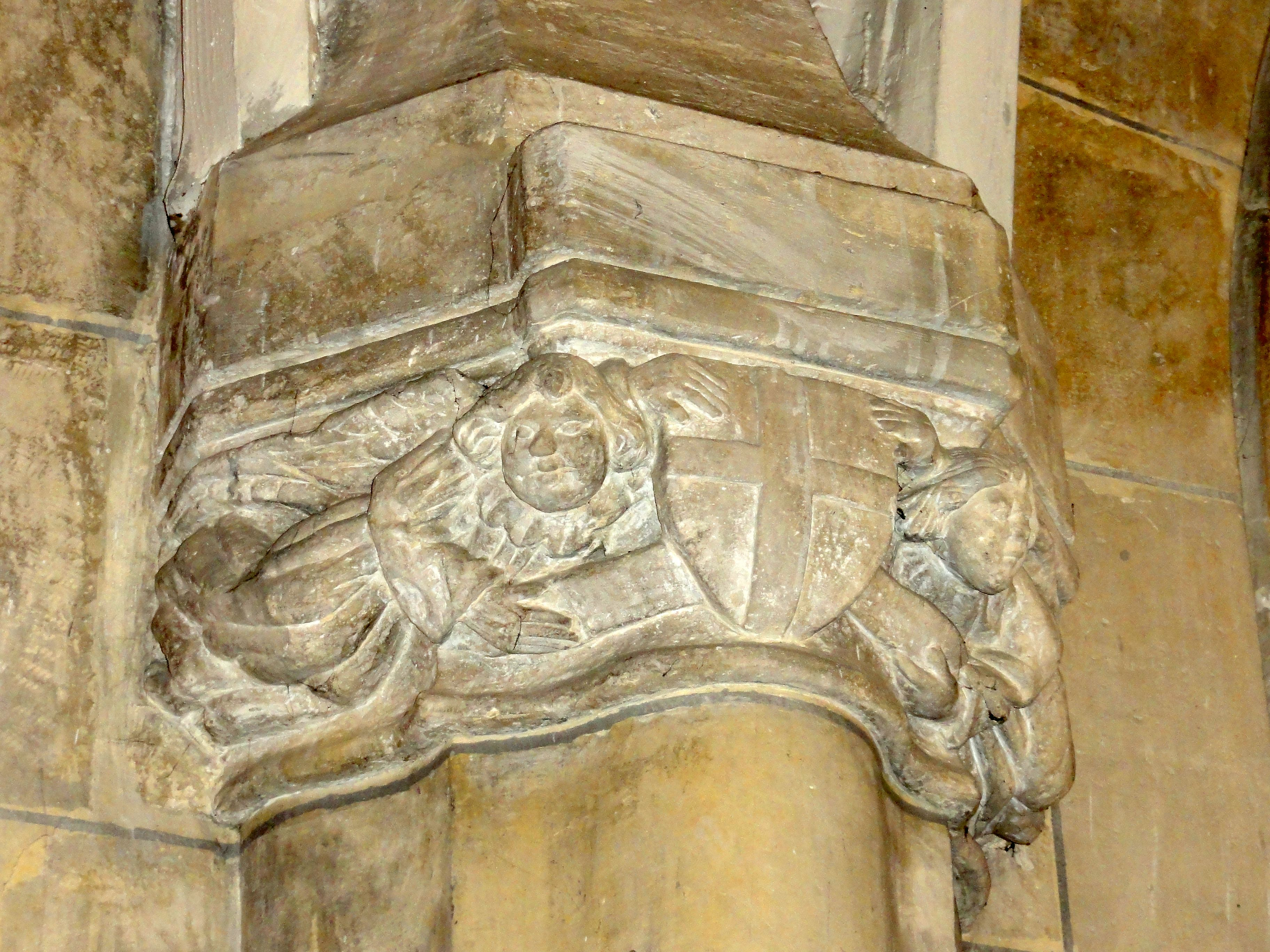 Collatéral sud, chapiteau entre 1Template:Ère et 2e travée.